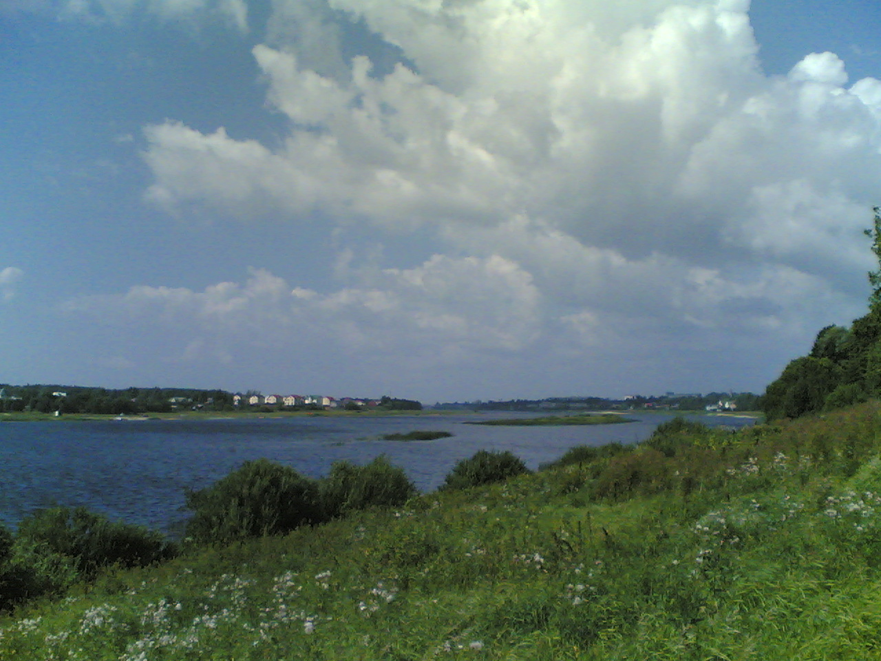 Вид на реку Великую из Промежиц в городе Пскове